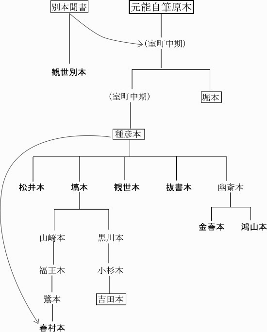 『申楽談儀』写本の系統を表す。 ゴシックは現存する写本、明朝体は現存しない写本。（）内は存在が想定される写本。 また特に重要なものは四角で囲った。 直線は写本の親子関係、曲線は加筆・校異に際しての参照関係を示す。